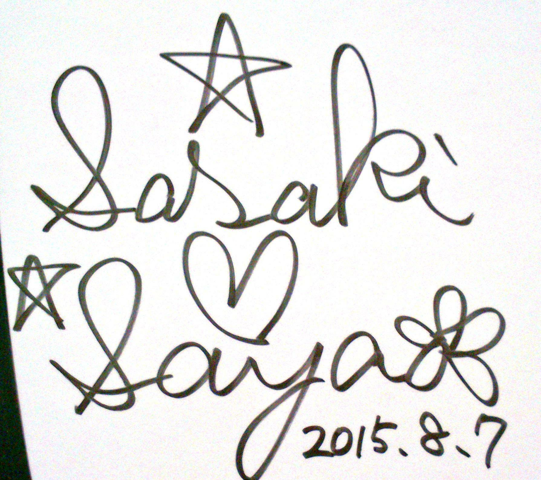 佐咲紗花在2015年漫畫博覽會的簽名，下方為英文「我愛臺灣」。